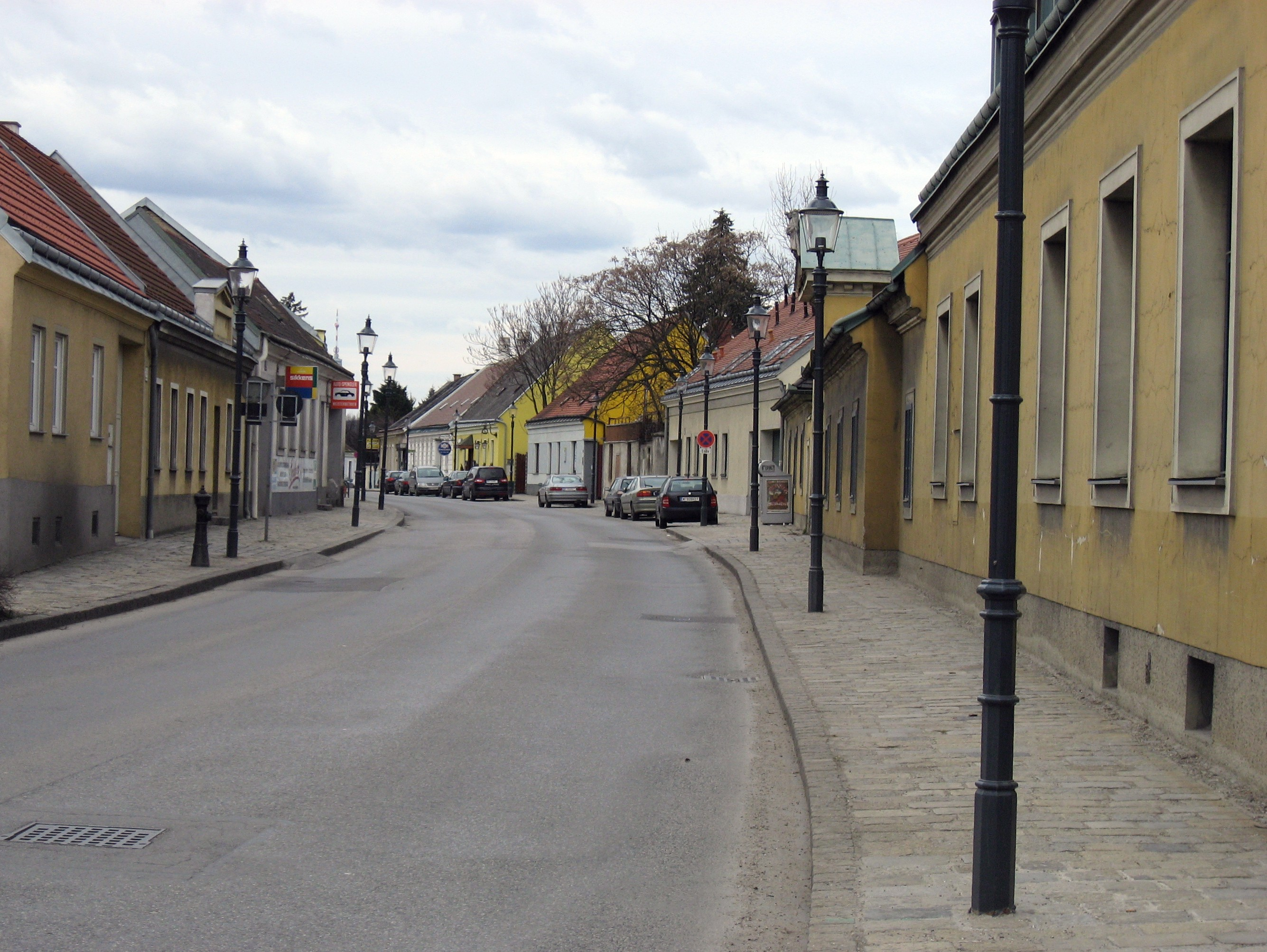 Wien-Hirschstetten, alter Ortskern